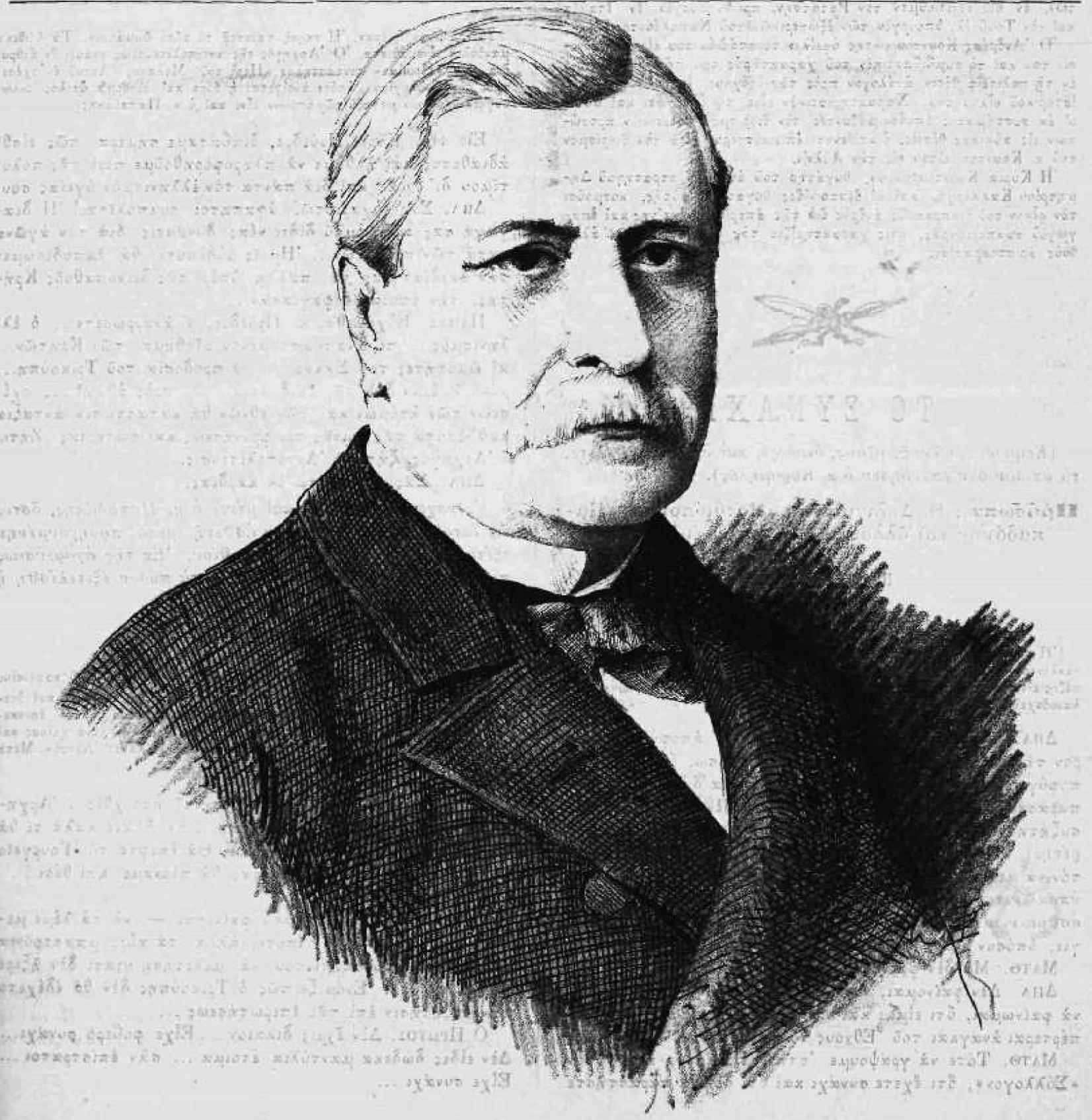 griechischer Politiker, 19. Jahrhundert